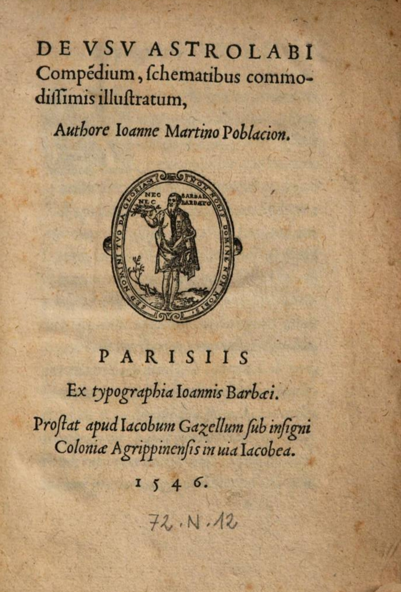 Portada de l'obra "De usu astrolabi compendium schematibus illustratum" de Joan Martí Població. Parisiis : Ex typographia Ioannis Barbaei, 1546.